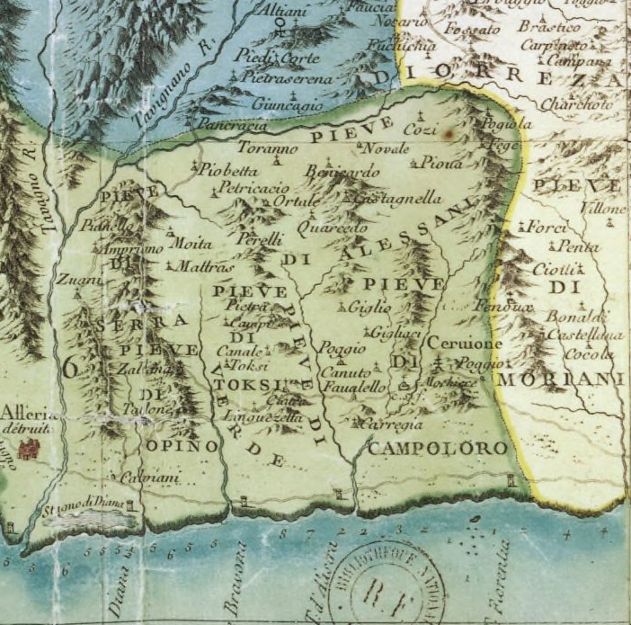 Extrait de la carte militaire concernant la pieve de La Serra et ses voisines, en 1768